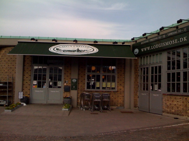 Løgismose at Nordre Toldbod in Copenhagen, Denmark